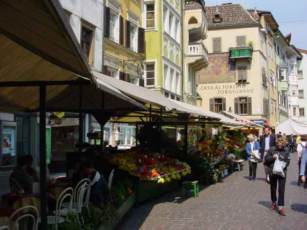 Bozen, Obstmarkt